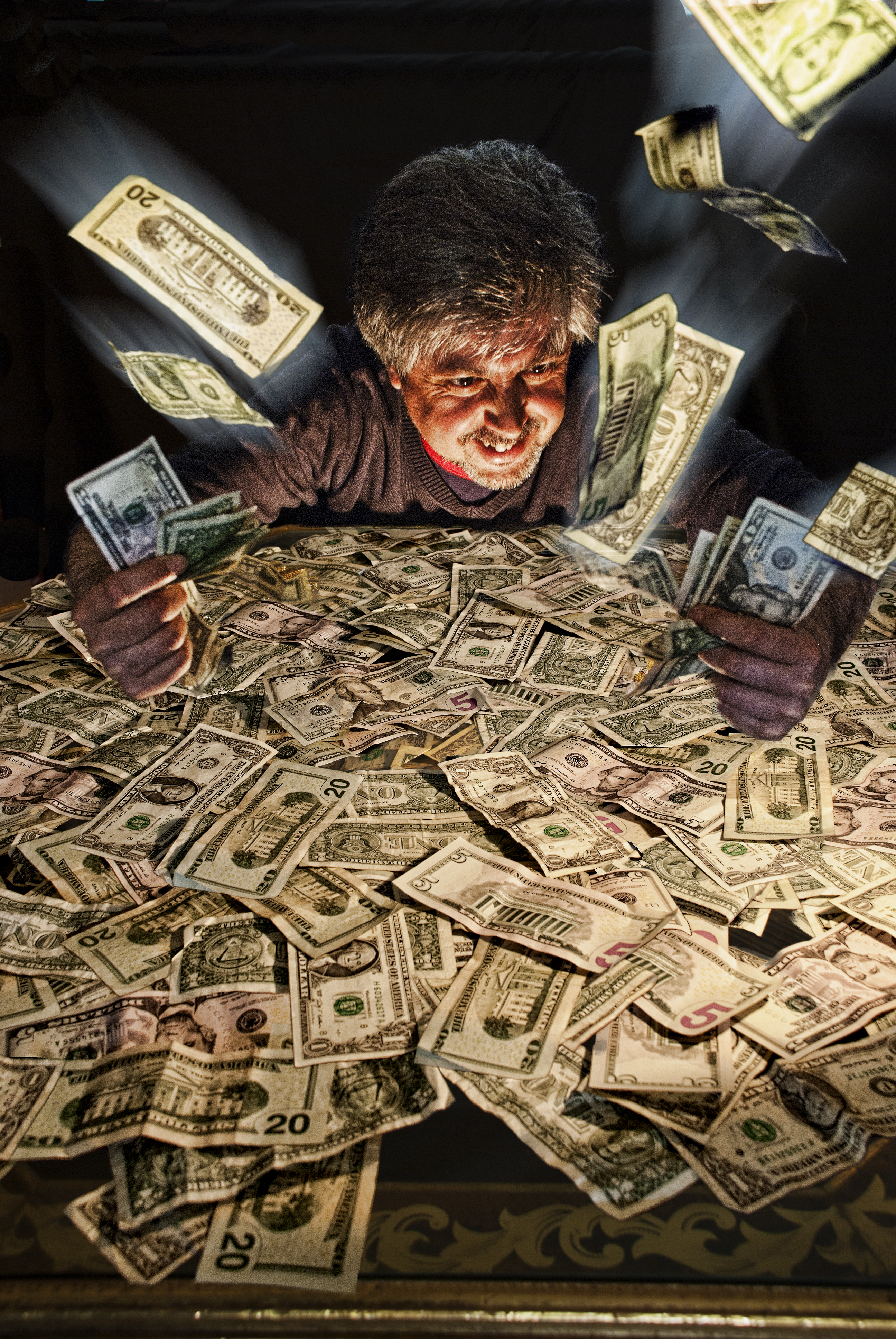 Pecados Capitales. Avaricia // Deadly Sins. Avarice I only had the money I hold in my hands...How I did it?? Have a look to the making of in my blog Para el reto de la semana 29 de 52 semanas de la familia fotera: 7 Pecados capitales. He escogido la Avaricia. Aunque creo que al final acabaré haciendo una serie completa con los 7..... Si quieres unirte al grupo, pincha aquí Solo tenía los dólares que tengo en mi mano... Quieres saber como lo hice?. El making of en mi blog